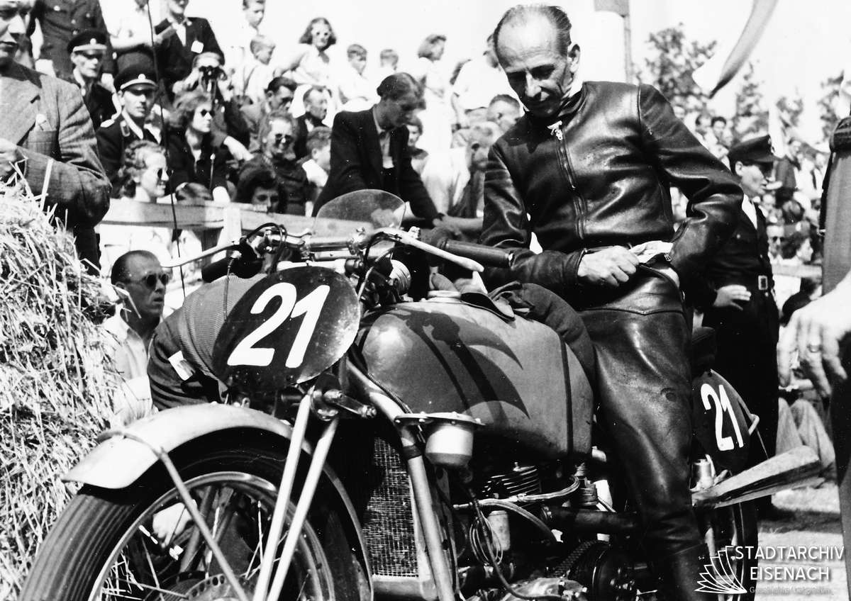 Walfried Winkler, Chemnitz, mit seiner 250-cm³-DKW mit Kompressor vor dem Start.